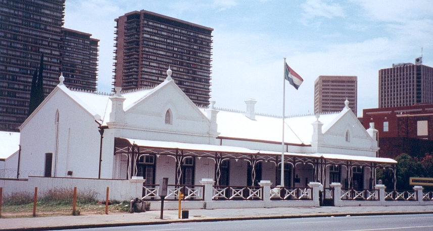 Auteur de la photo : FC Georgio Sujet : Maison de Paul Kruger Lieu: Church Street, Pretoria Année : 1998